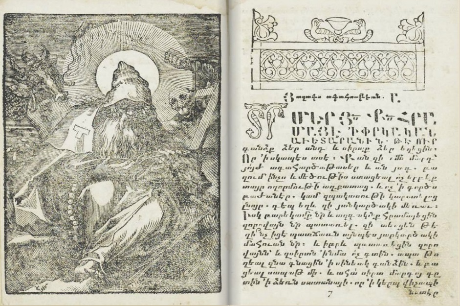 Армянский перевод "Великого зеркальца". Издание 1702 года.